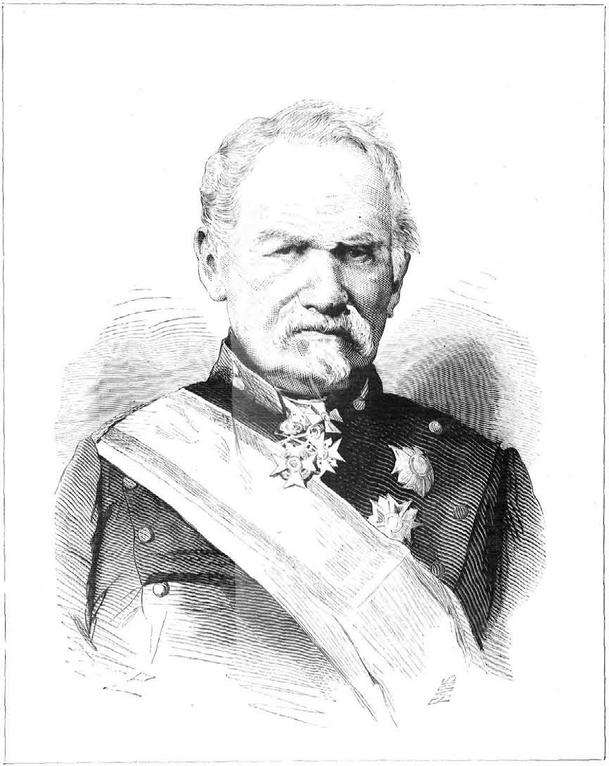 Francisco de Elorza y Aguirre, grabado de Marcelo Paris por dibujo de Daniel Perea. La Ilustración Española y Americana, 16 de diciembre de 1873.